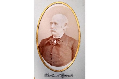 Portrait